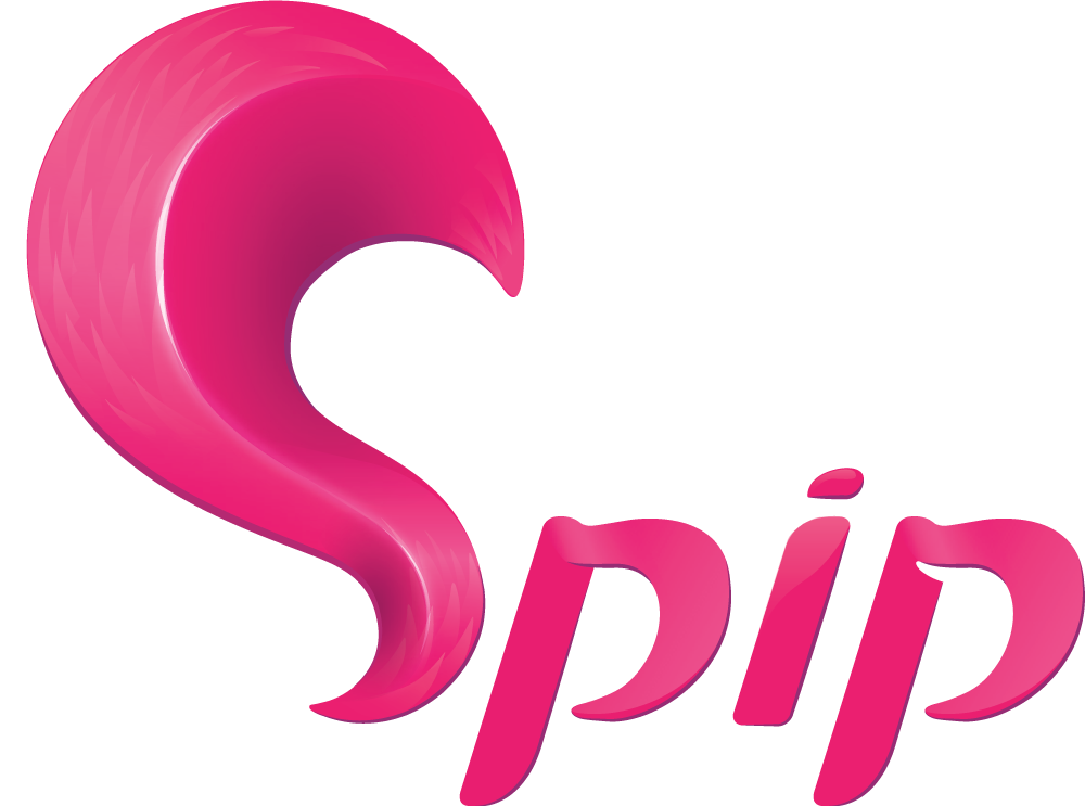 Logo SPIP version 2017